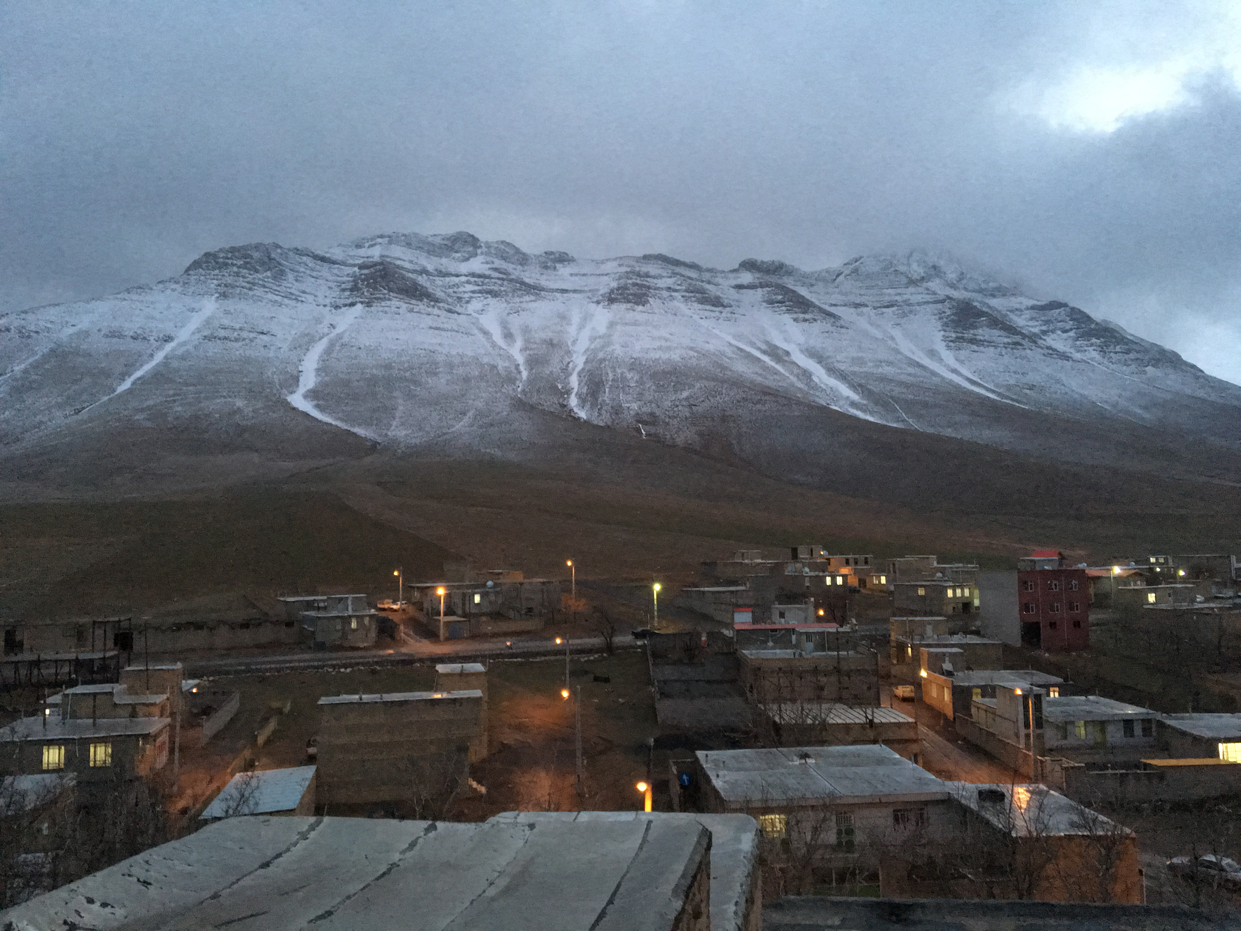 نمایی از واشه در یک غروب زمستانی از کوه راهزان و خانه های روستایی